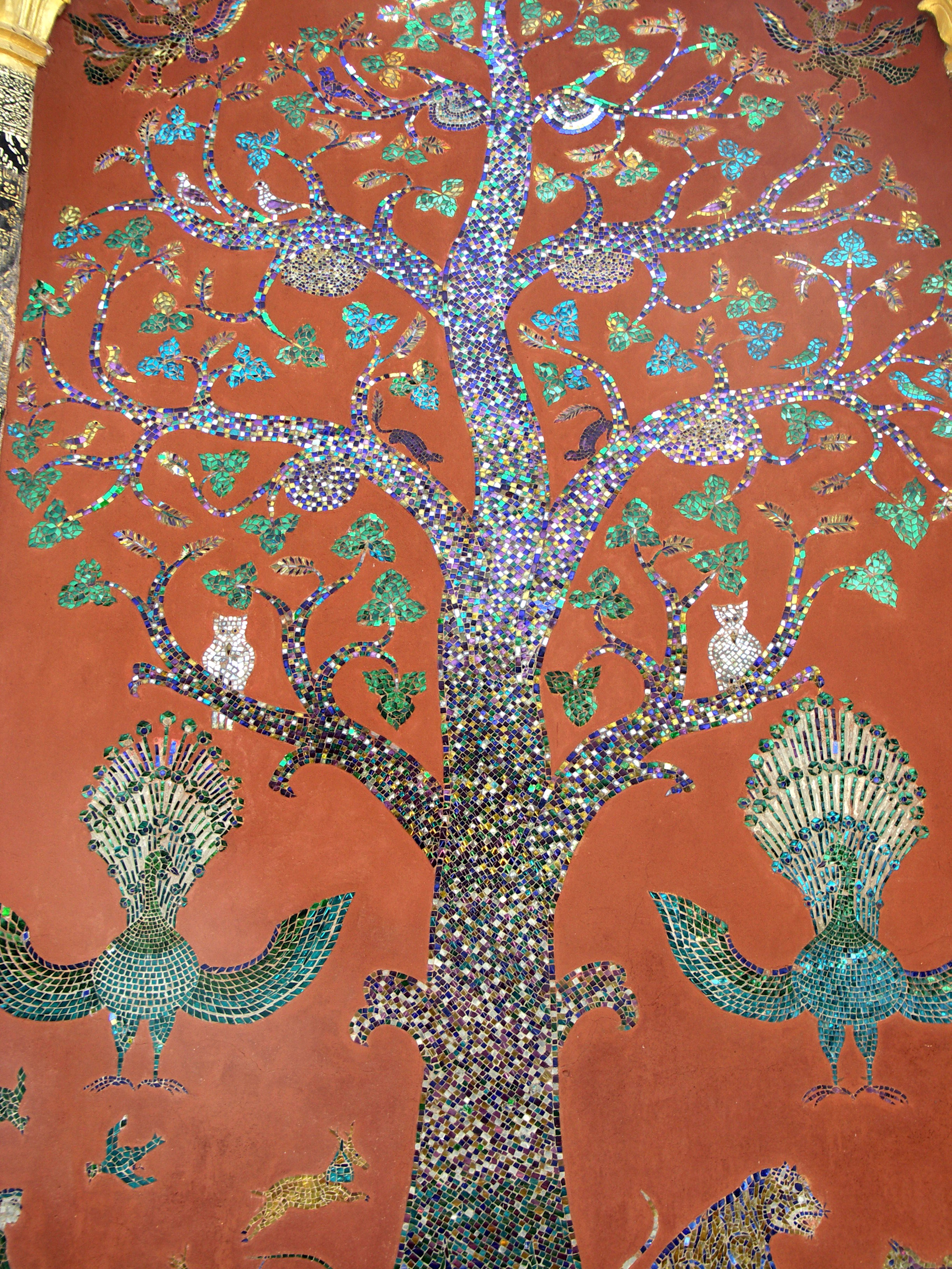 Luang Prabang, DPR Lao